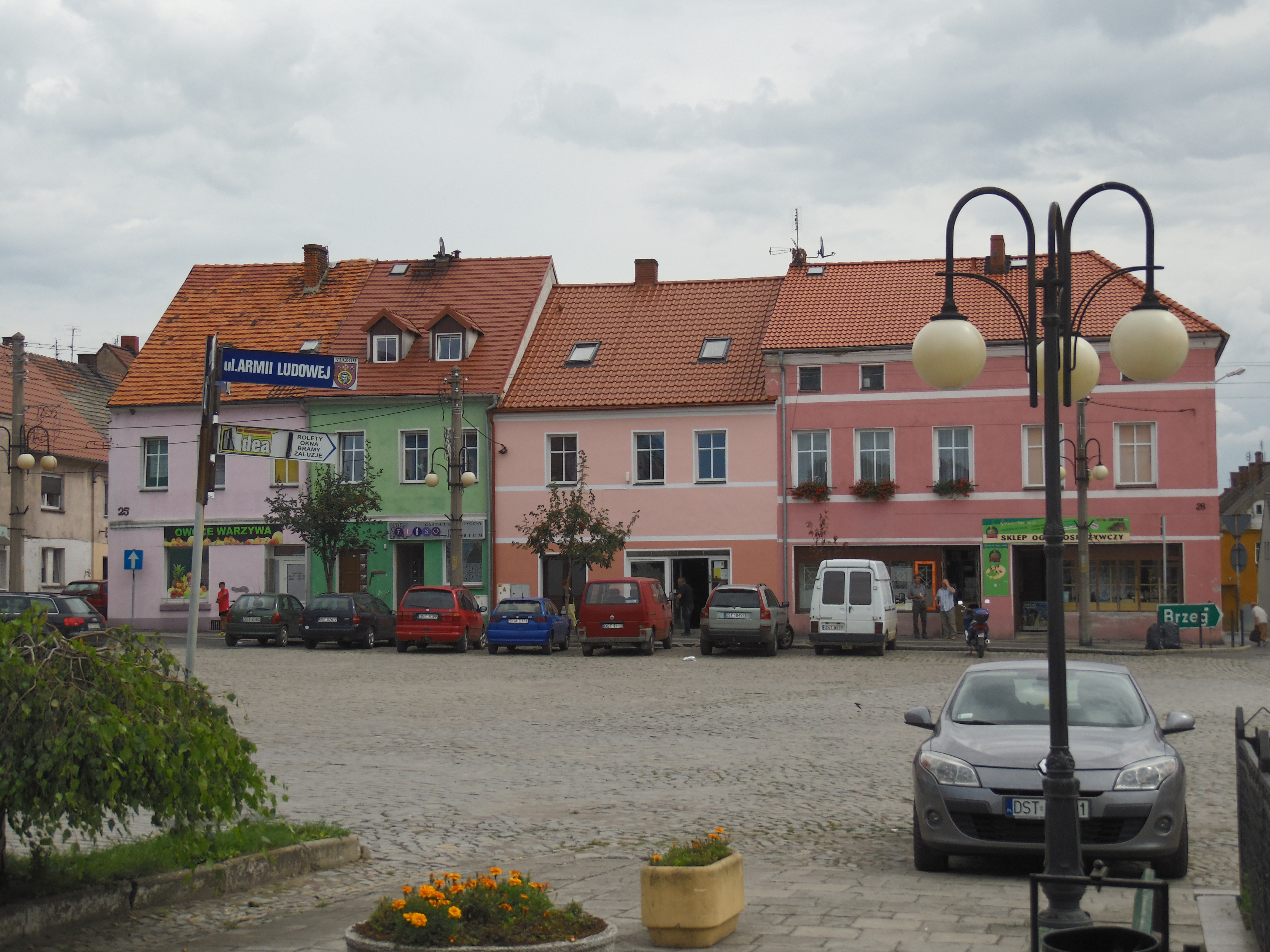 Wiązów, Poland